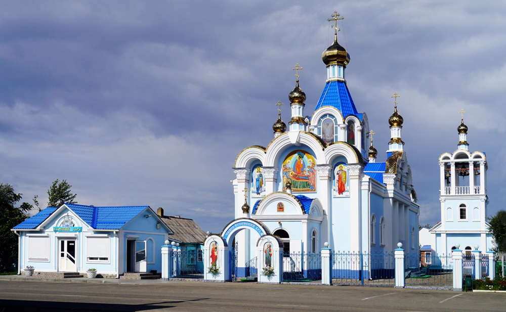 Свято-Успенский храм в г. Белореченск